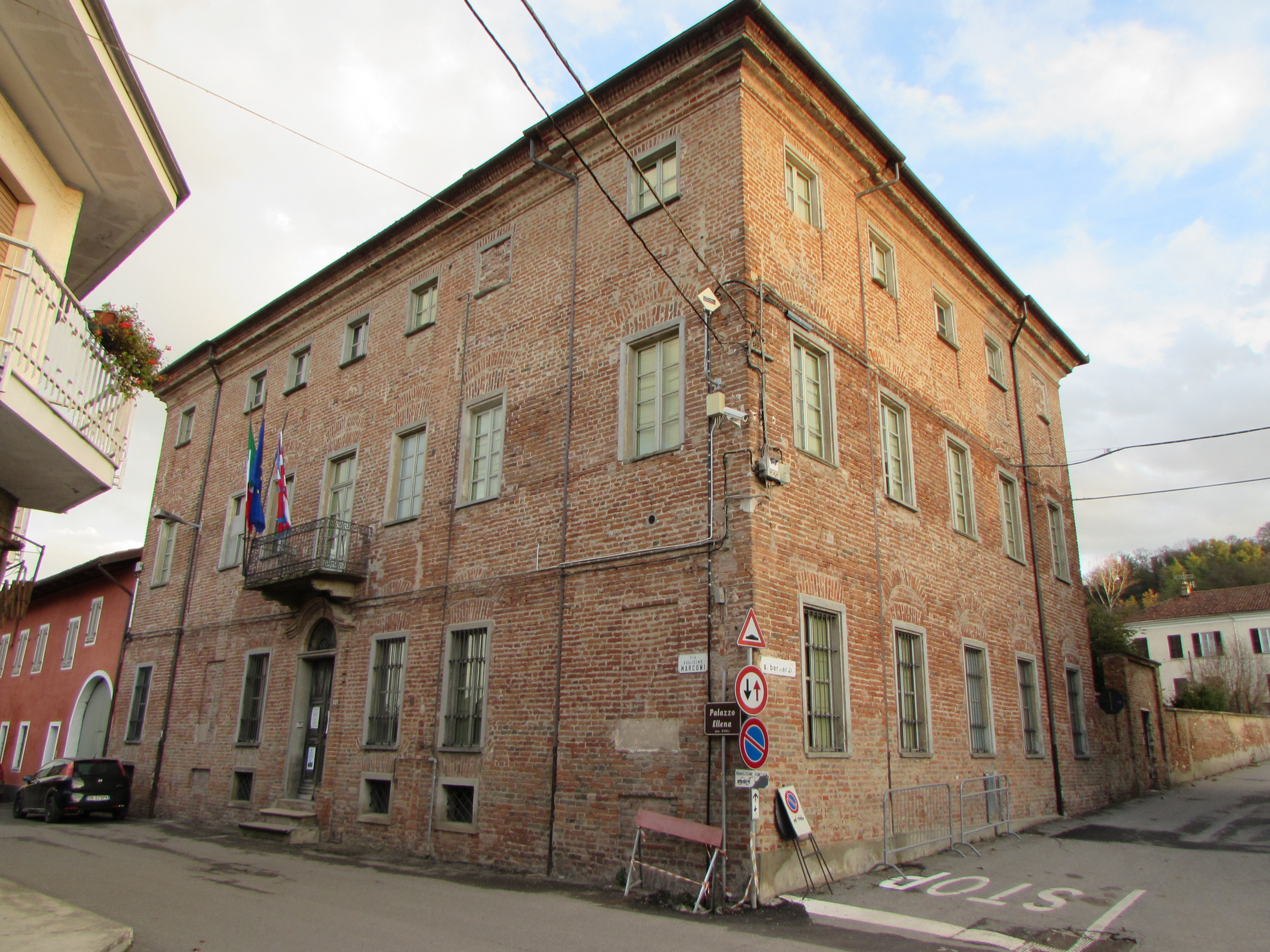 Veduta di Palazzo Ellena